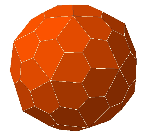 Hexecontaedro pentagonal